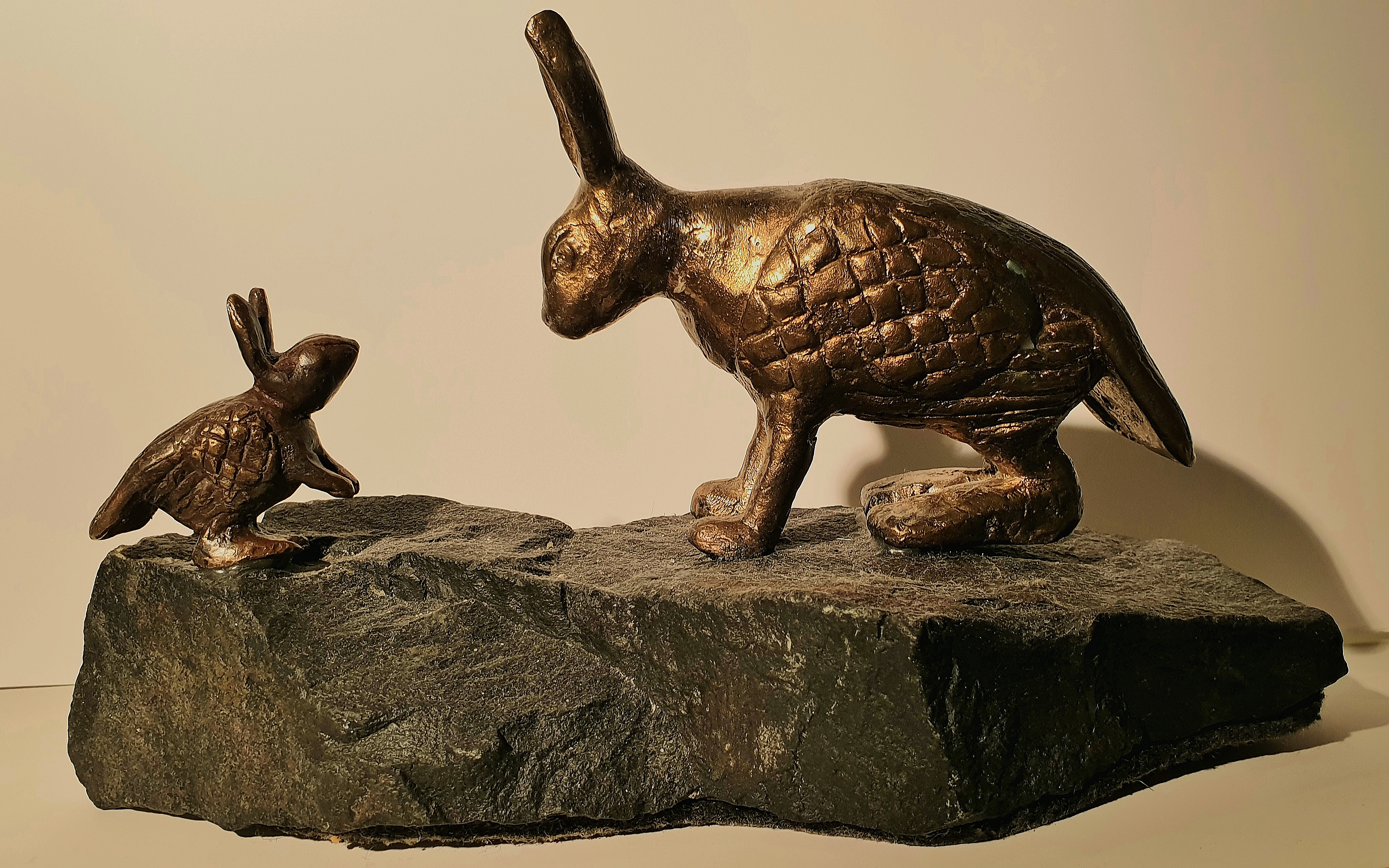 Skulptur i brons på diabassockel av Göran Janulf. Motiv är skvadrar.